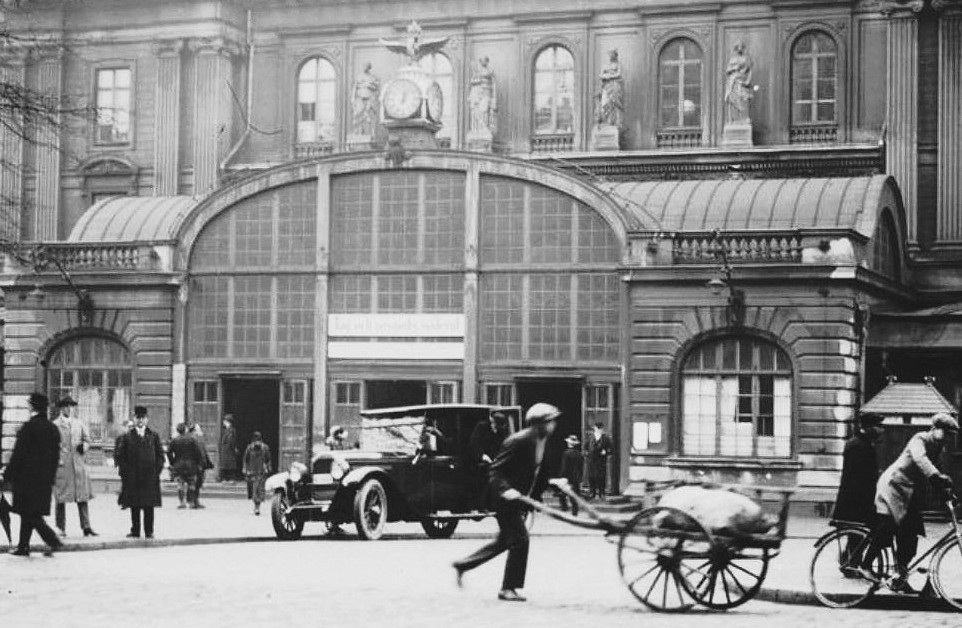 Biljetthallen "Puckeln"" framför Stockholms central